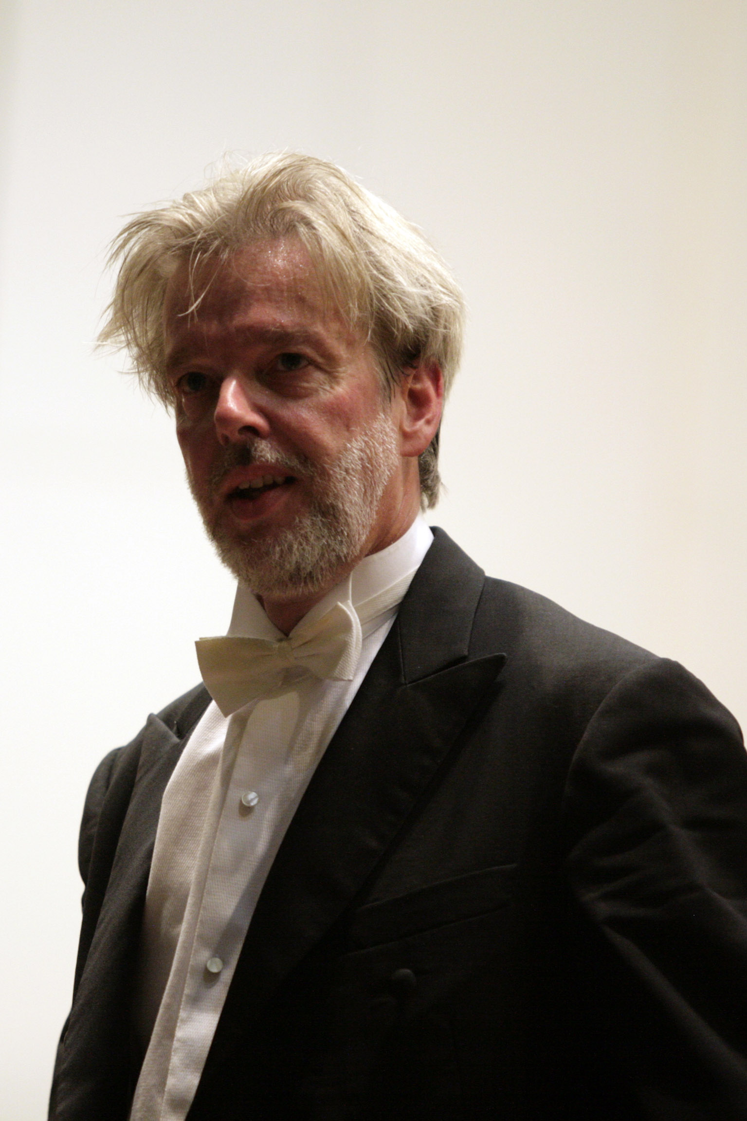 Direttore, Jukka Pekka Saraste photo by ©Lelli e Masotti